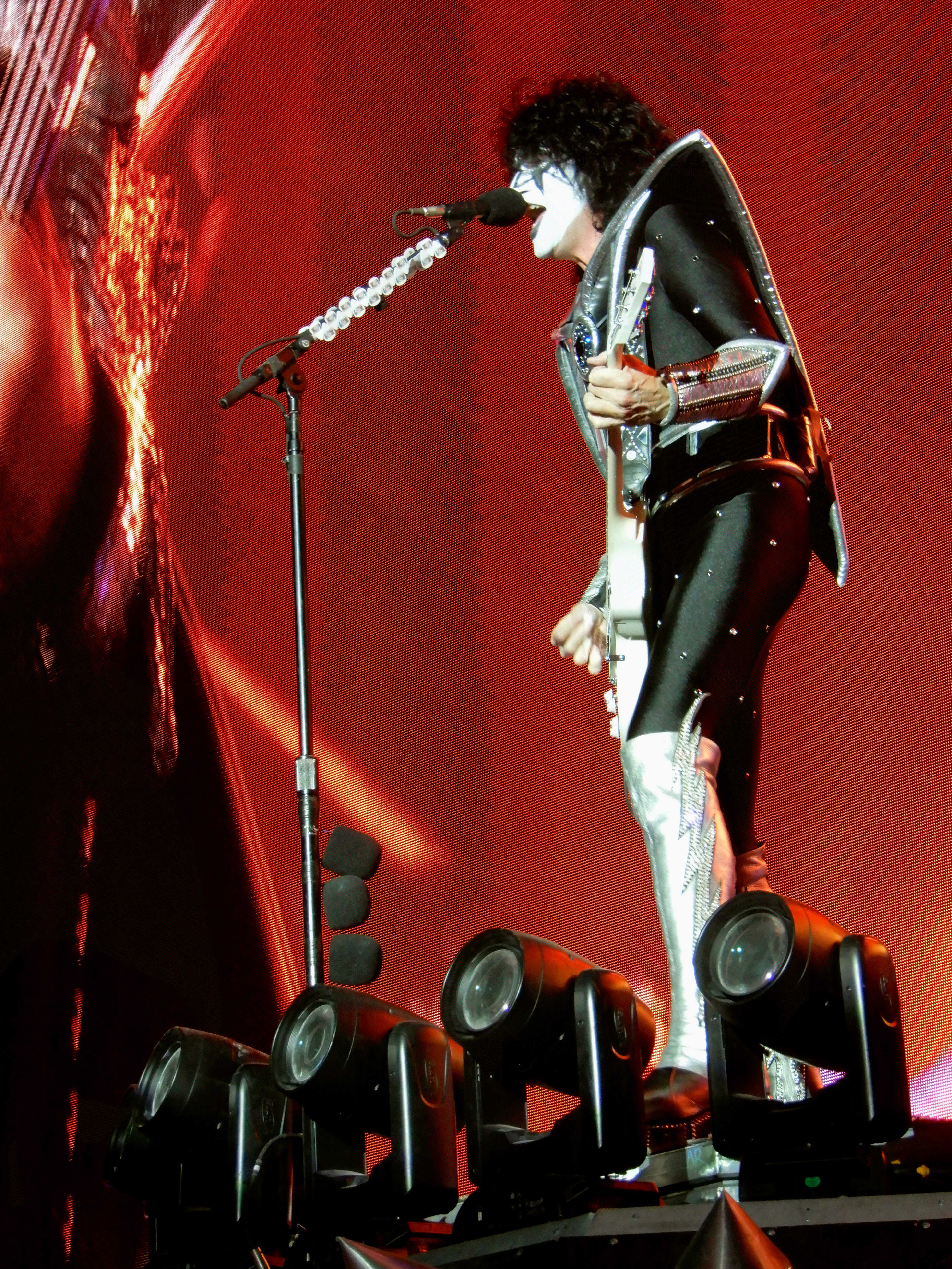 Tommy Thayer au Hellfest 2019